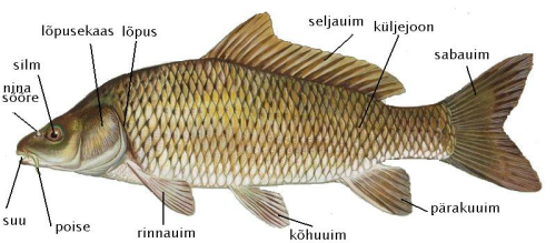 Kala